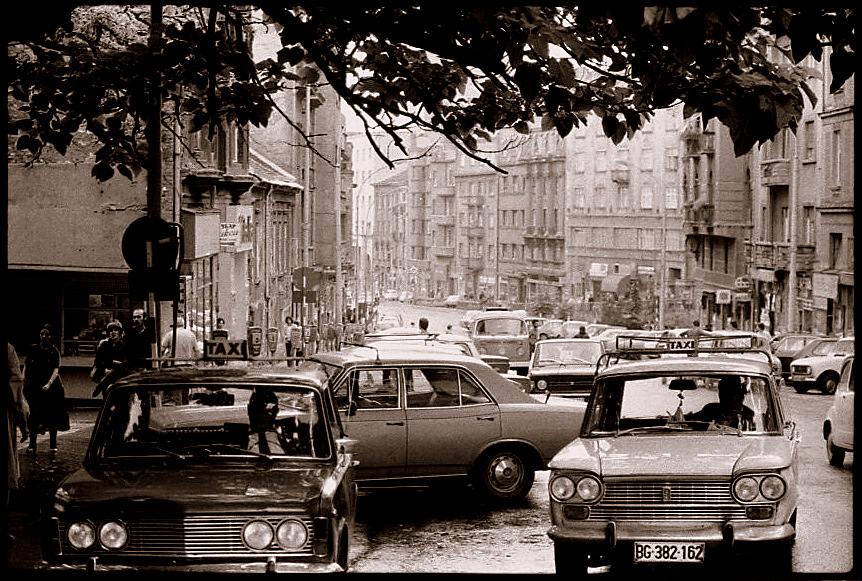 beograd 79